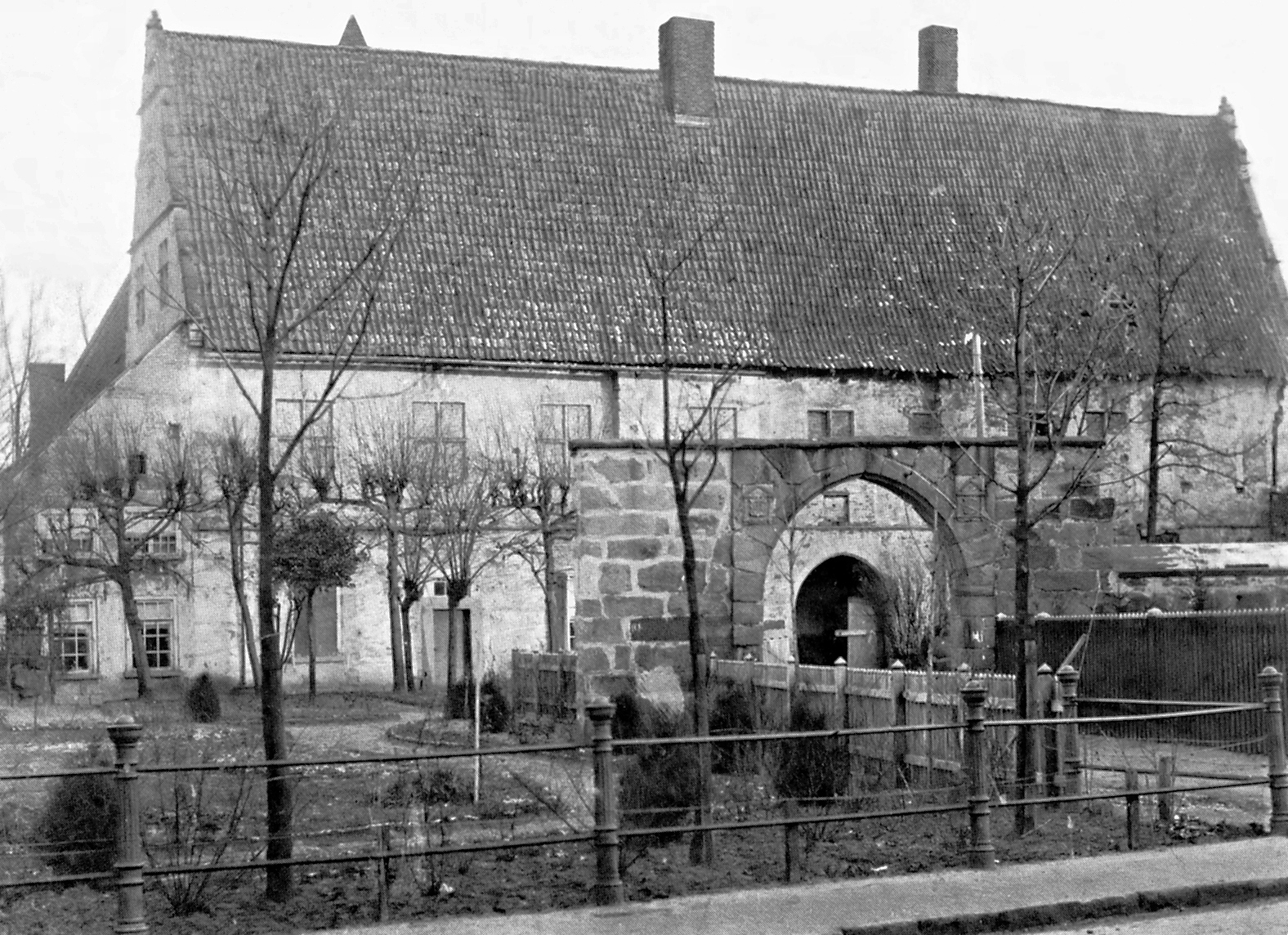 Westseite der Burg Altena Schüttorf 1903 vor dem Umbau